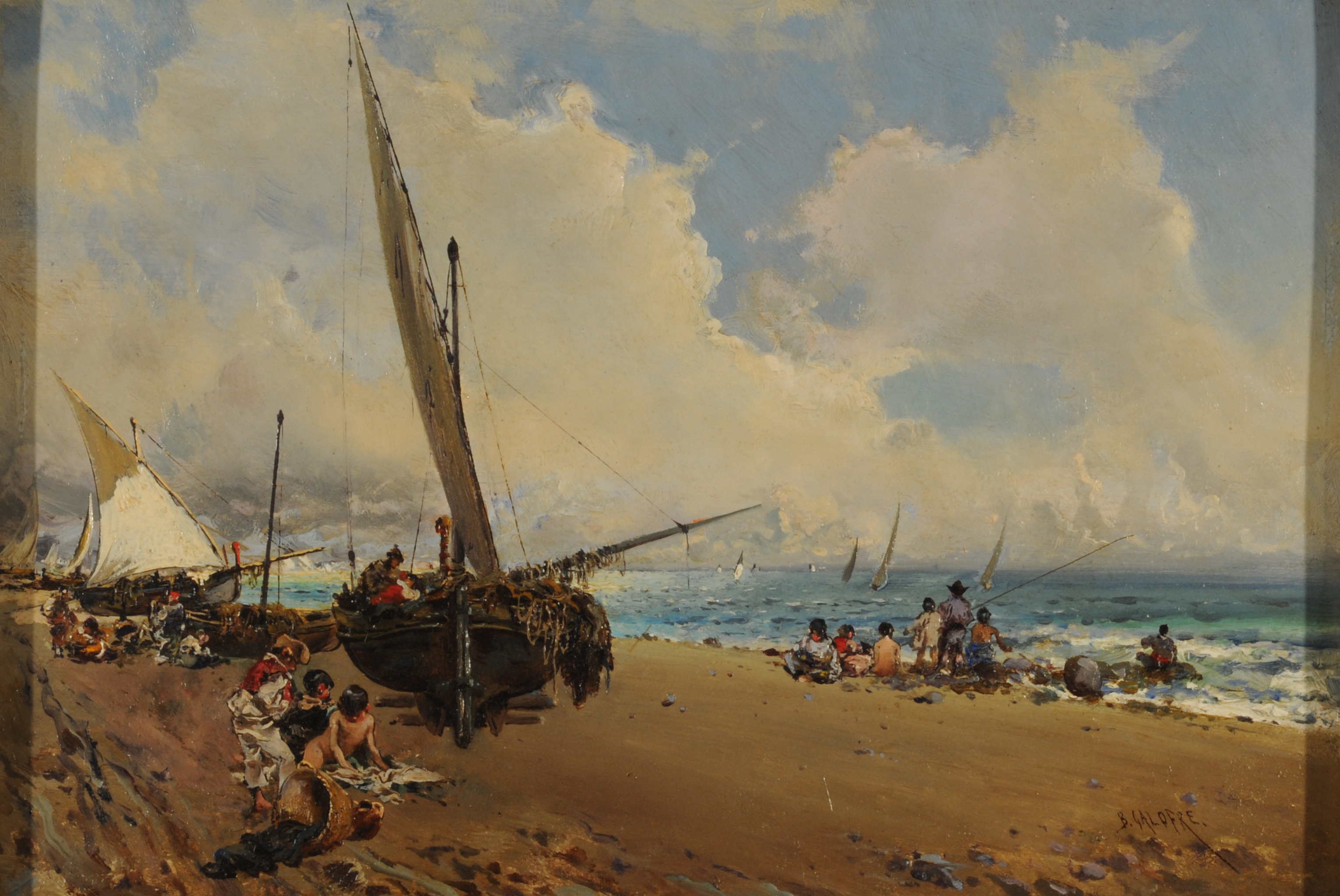 Baldomero Galofré Jiménez, En la playa, circa 1880/1886. Óleo sobre tabla, 17,5 x 25 cm. Marco: 47,5 x 53 x 2,5 cm. Inv. 2615.